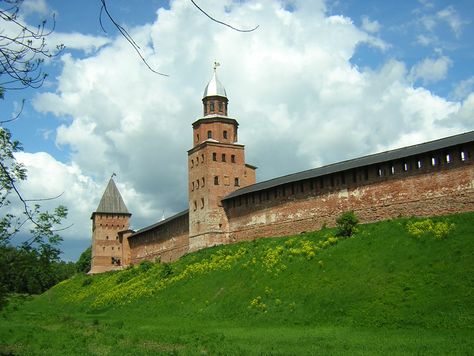 Новгородский Детинец. Башня Кокуй и Покровская башня